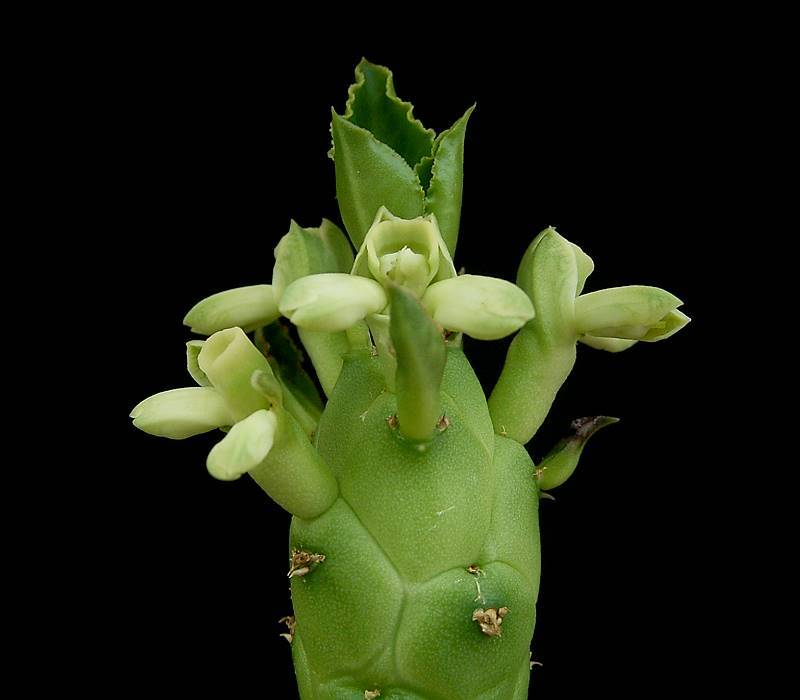 Euphorbia lugardiae